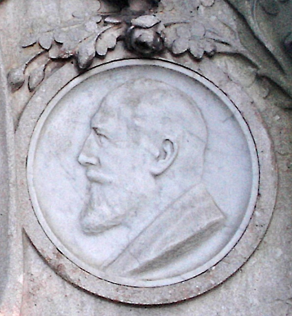 Ferdinand Scipio (1837-1905), Mannheimer Unternehmer, Portraitrelief auf dem Familiengrab, Hauptfriedhof Mannheim